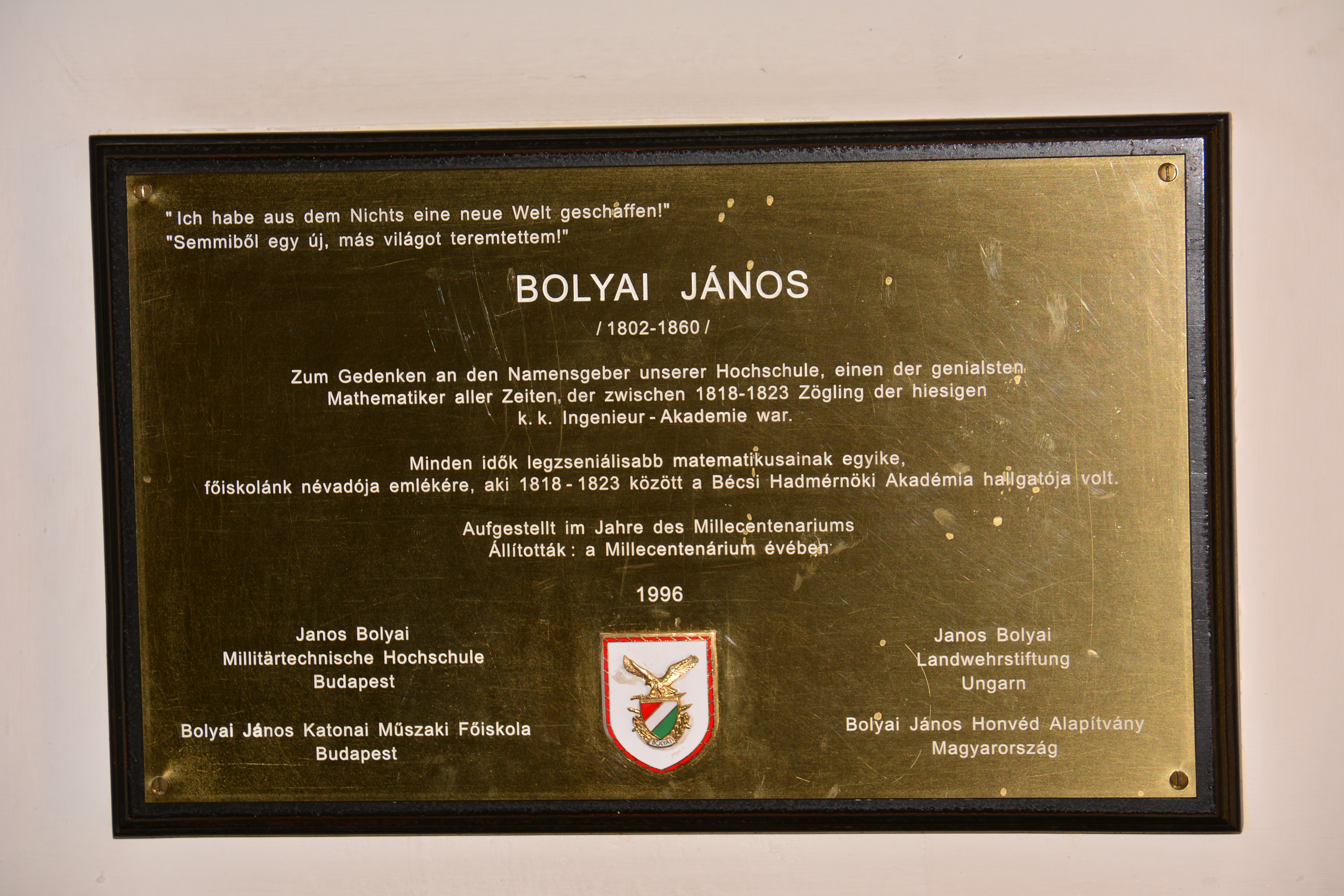 Gedenktafel für János Bolyai (Wien, Mariahilfer Straße 22 – 24, Stiftskirche)